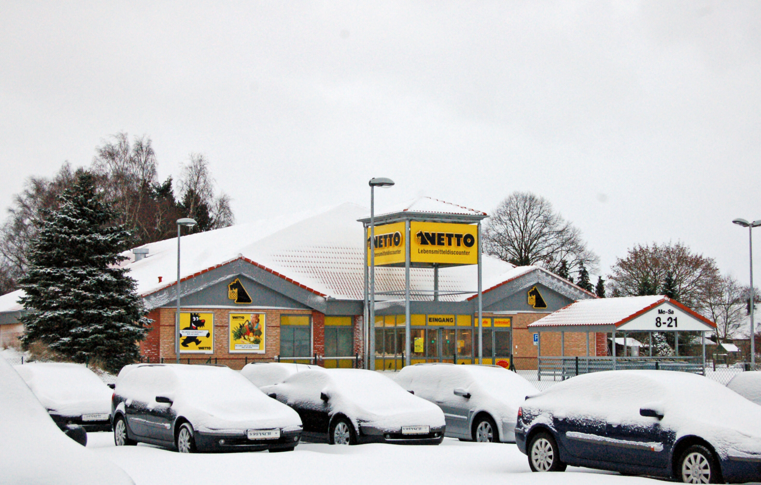 Blick auf den neuen Netto-Markt in Uetersen nach den ersten Ausläufern des Sturmtiefs Daisy am Morgen des 10.01.2010